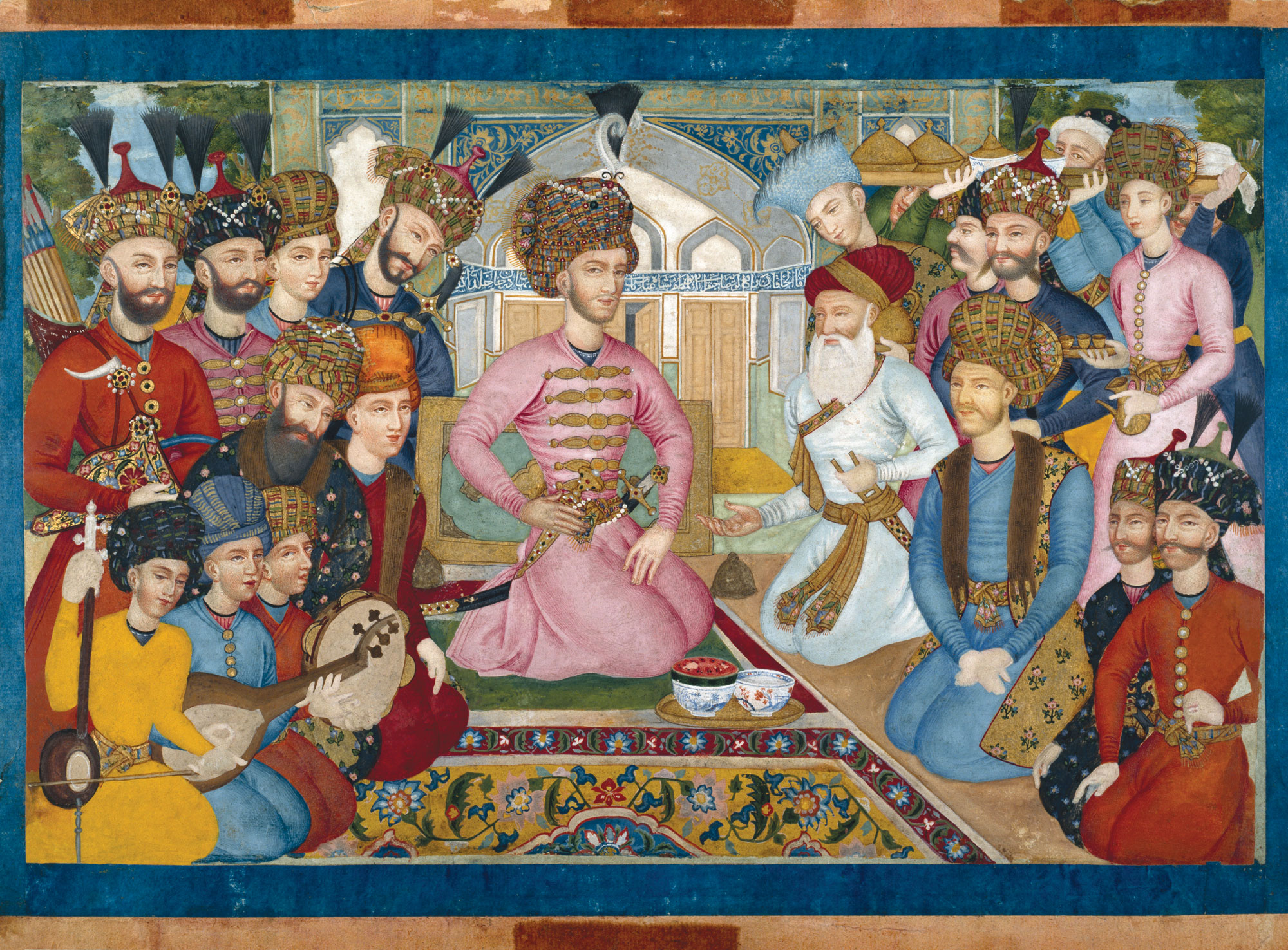 الشاه عبَّاس بن صفيّ الصفوي، سابع شواهين الدولة الصفويَّة يقبع في وسط الرسم، وإلى اليمين سفارة مغوليَّة هنديَّة